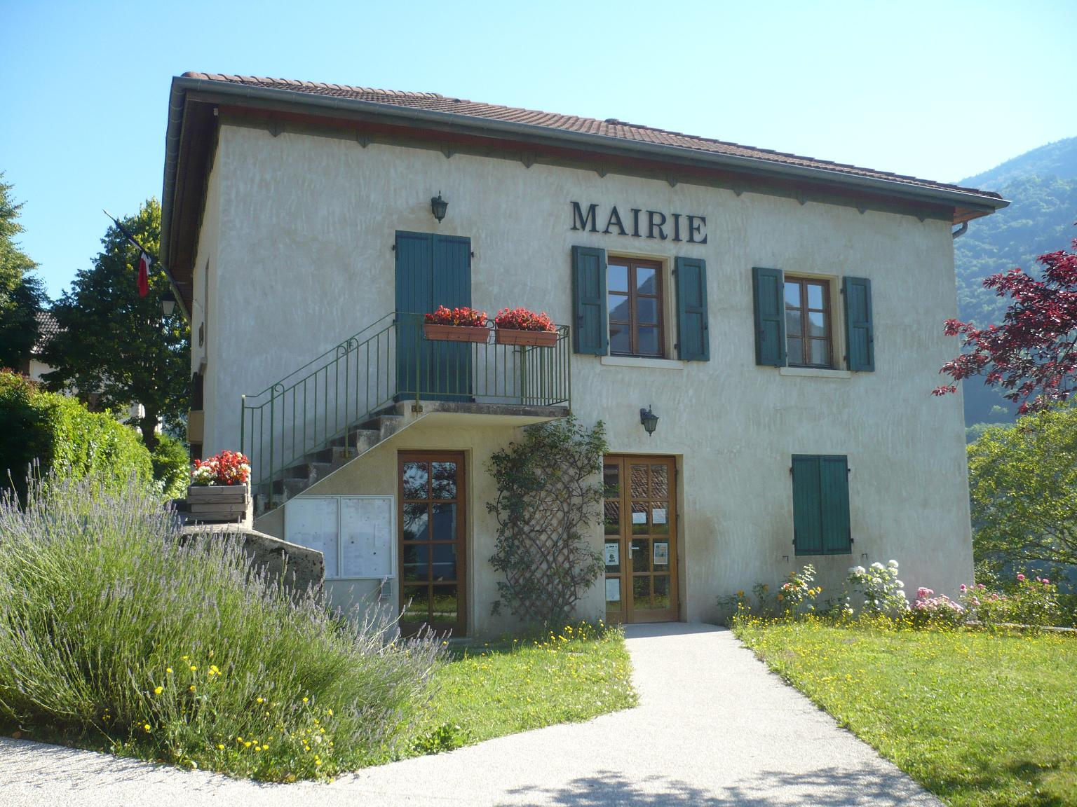 La mairie.